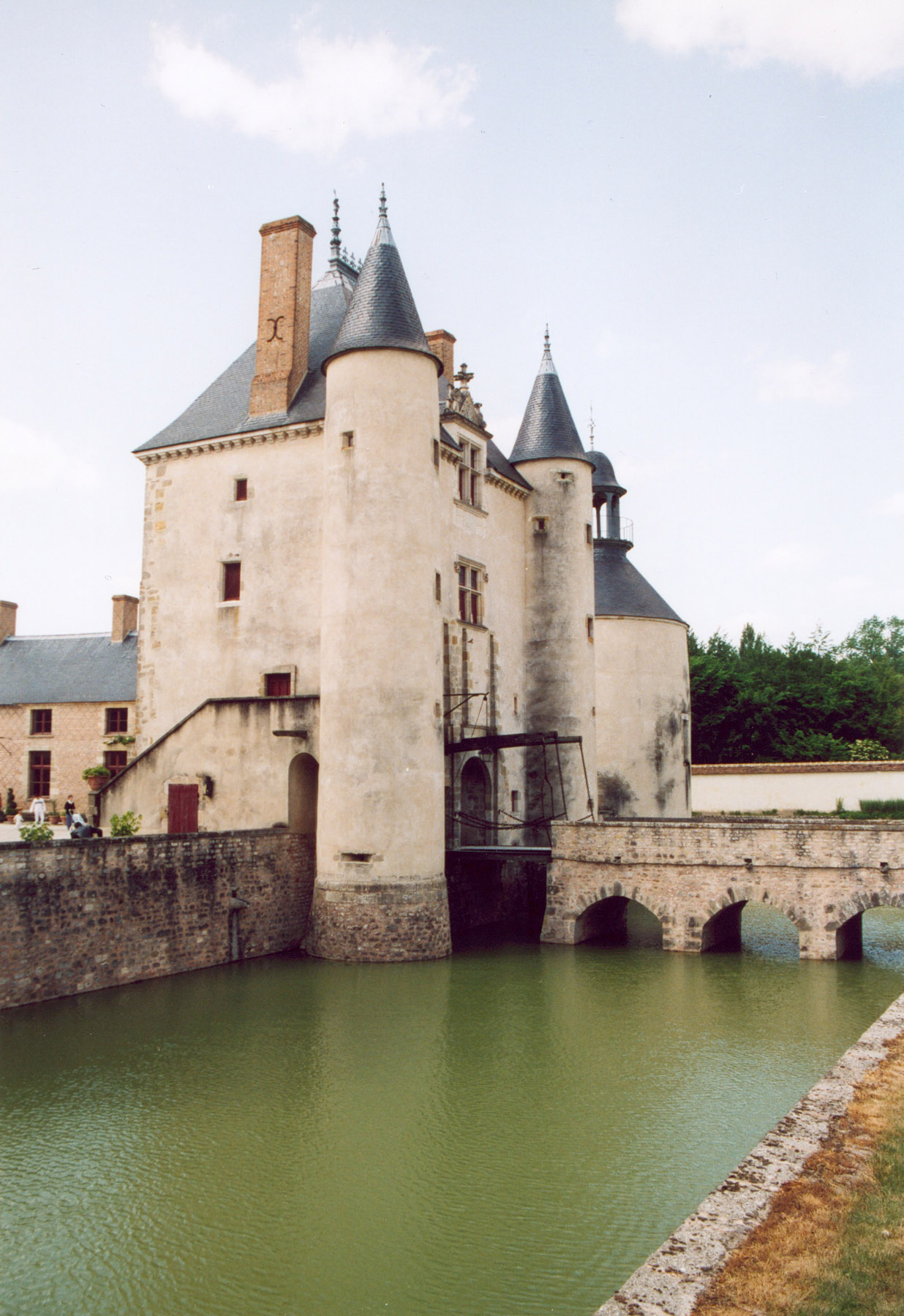 Le Château de Chamerolles Auteur GIRAUD Patrick